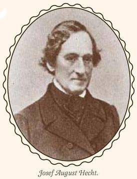 Josef August Hecht (1792-1861), český lázeňský podnikatel a politik německé národnosti